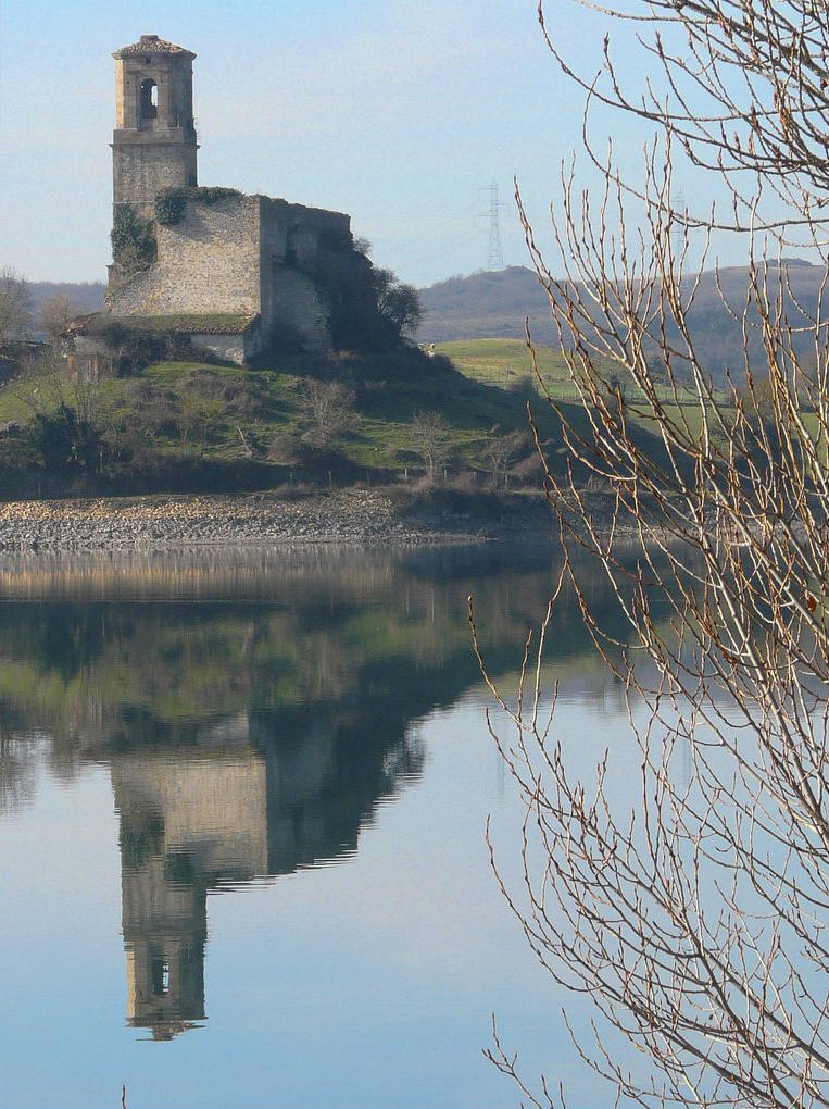 Zurbaoko eliza, Arratzu-Ubarrundia.